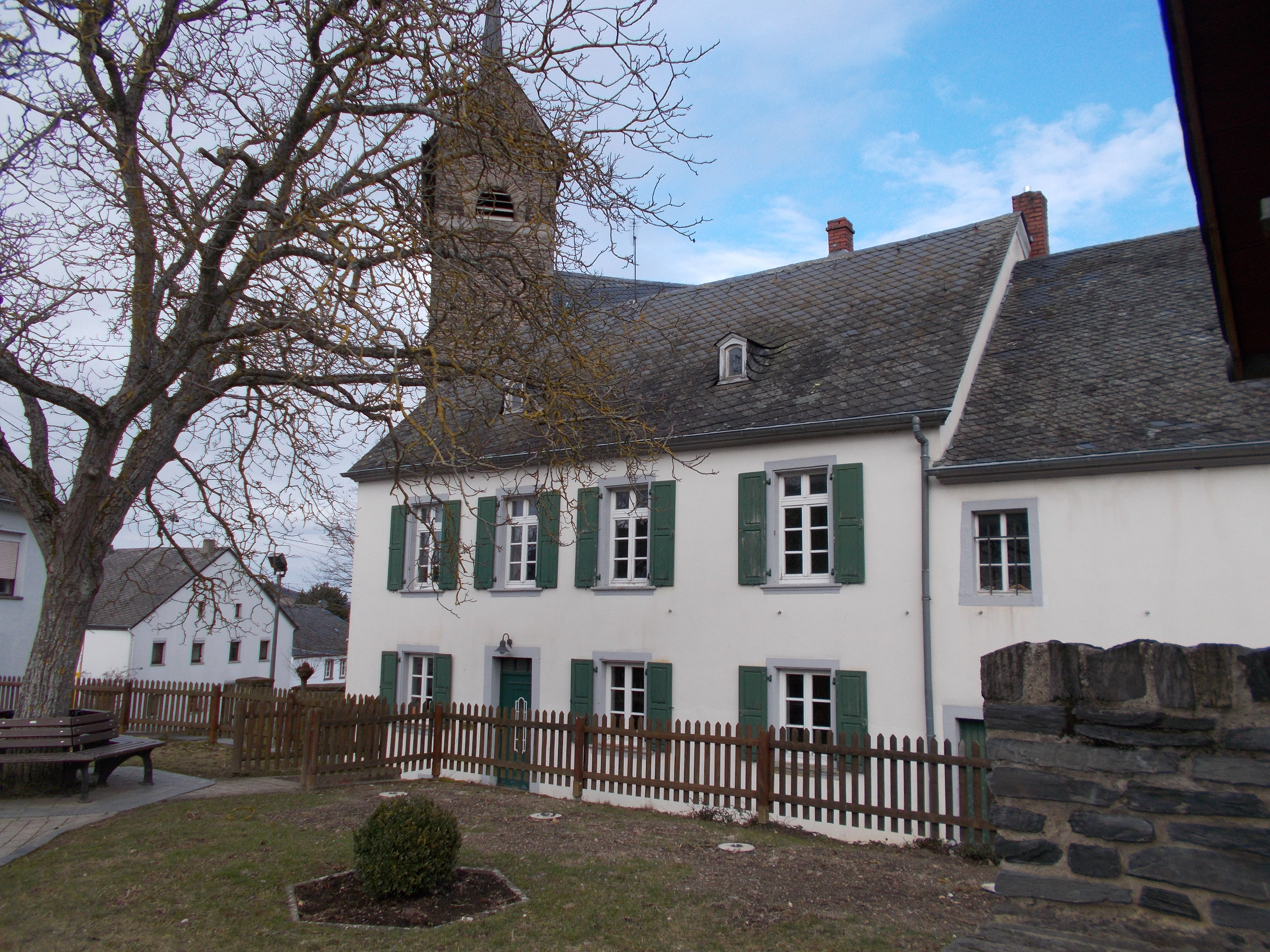 Katholisches Pfarrhaus, Kirchstraße 2, Streckhof, 1760, Erweiterung 1896